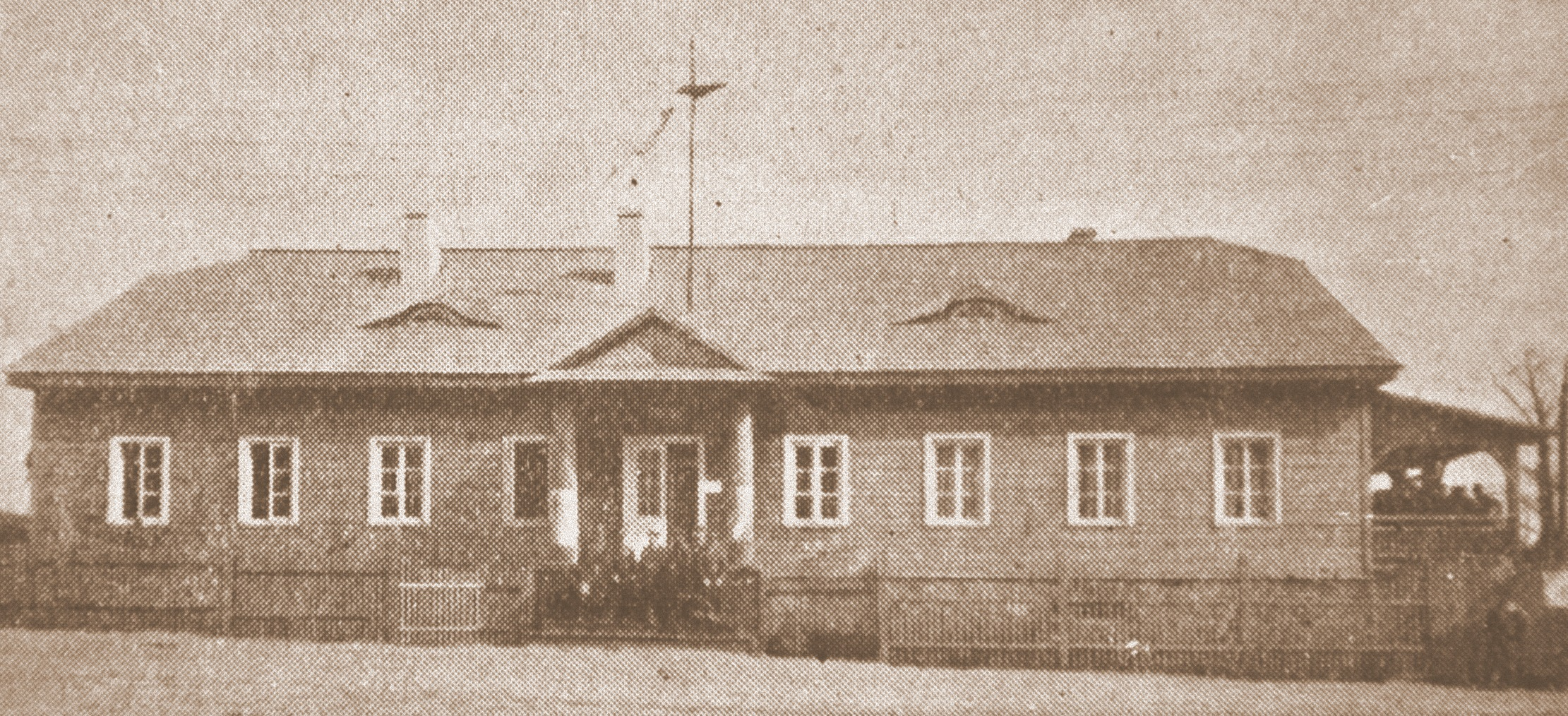 Oryginalny podpis pod zdjęciem: Dowództwo 3-ej brygady